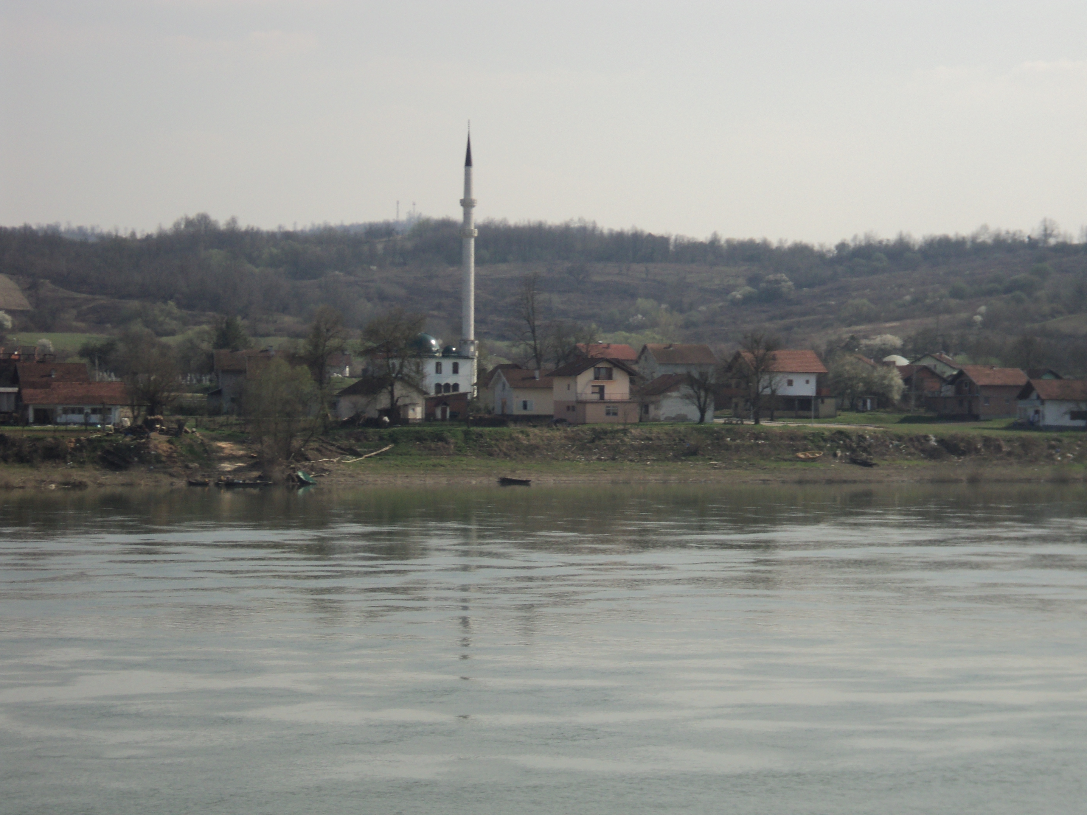 Босански Дубочац, Република Српска, сликан из Славонског ДубочцаBosanski: Bosanski Dubočac, Republika Srpska, slikan iz Slavonskog DubočcaHrvatski: Bosanski Dubočac, Bosna i Hercegovina, slikan iz Slavonskog Dubočca